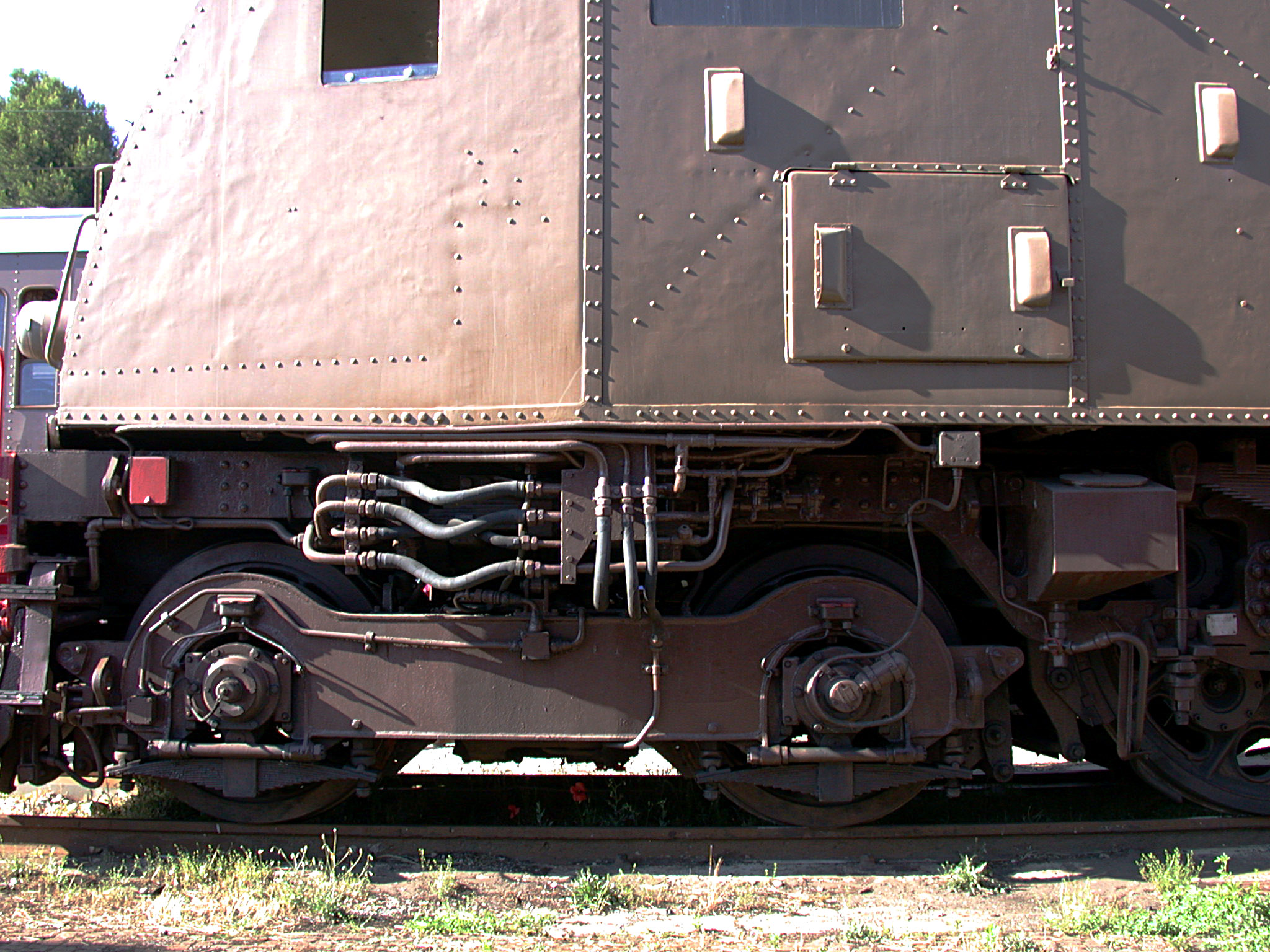 Locomotiva FS E.428 226 al deposito di Rimini il 6/6/2004